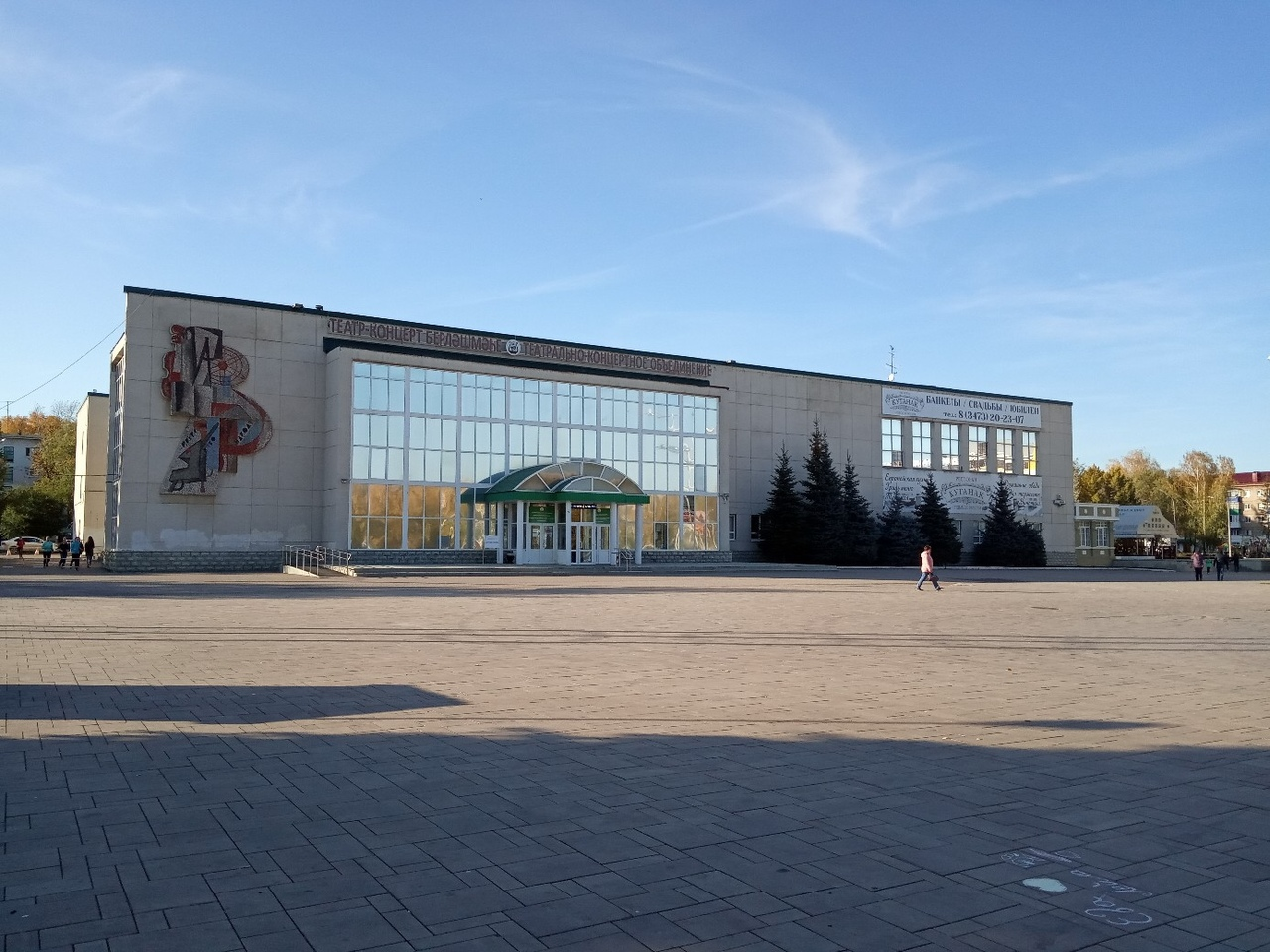 Театрально-концертное объединение г. Стерлитамака РБ